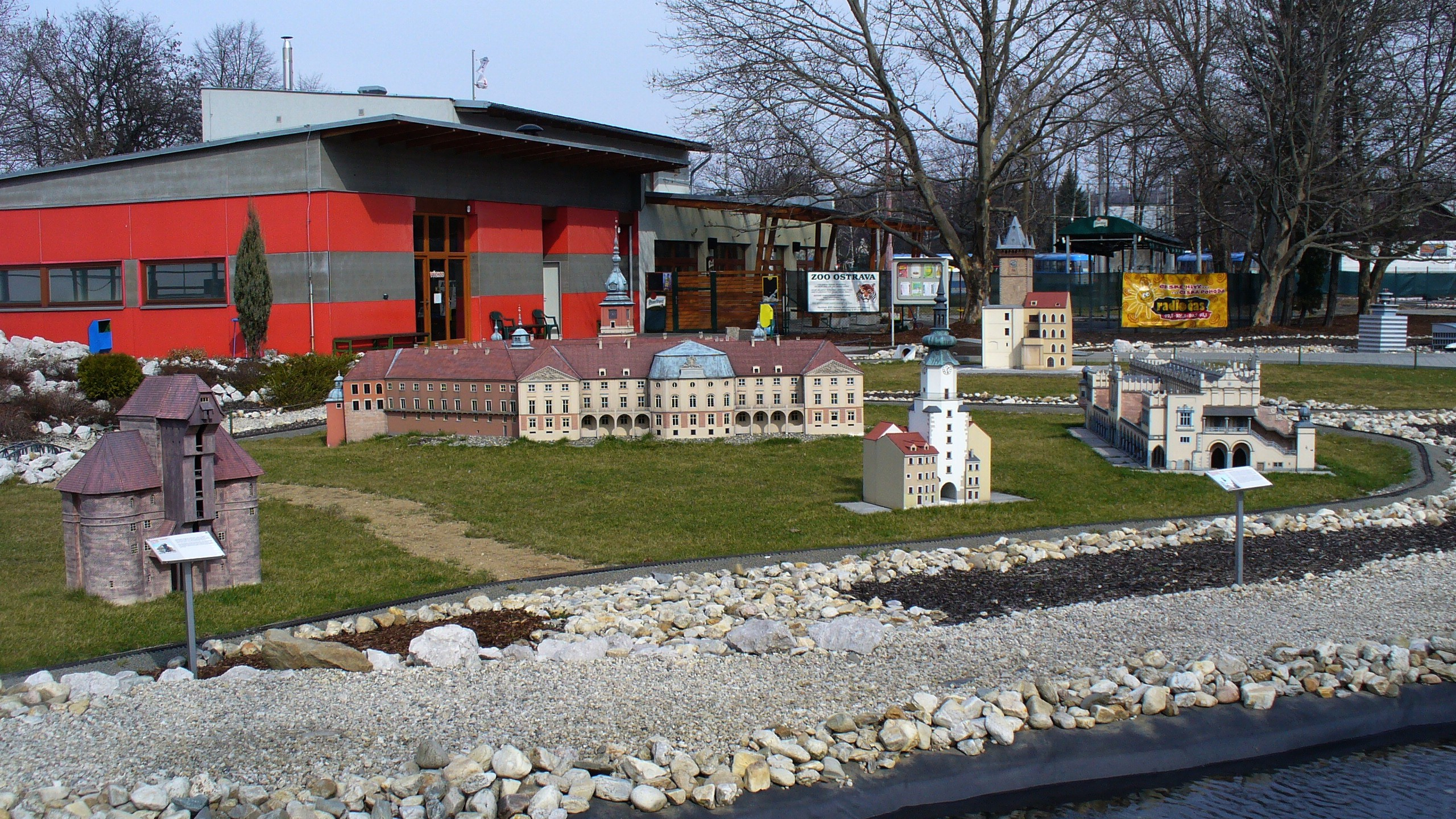 Miniature Park Miniuni in Ostrava (Ostrawa, Ostrau) - Czech Republic